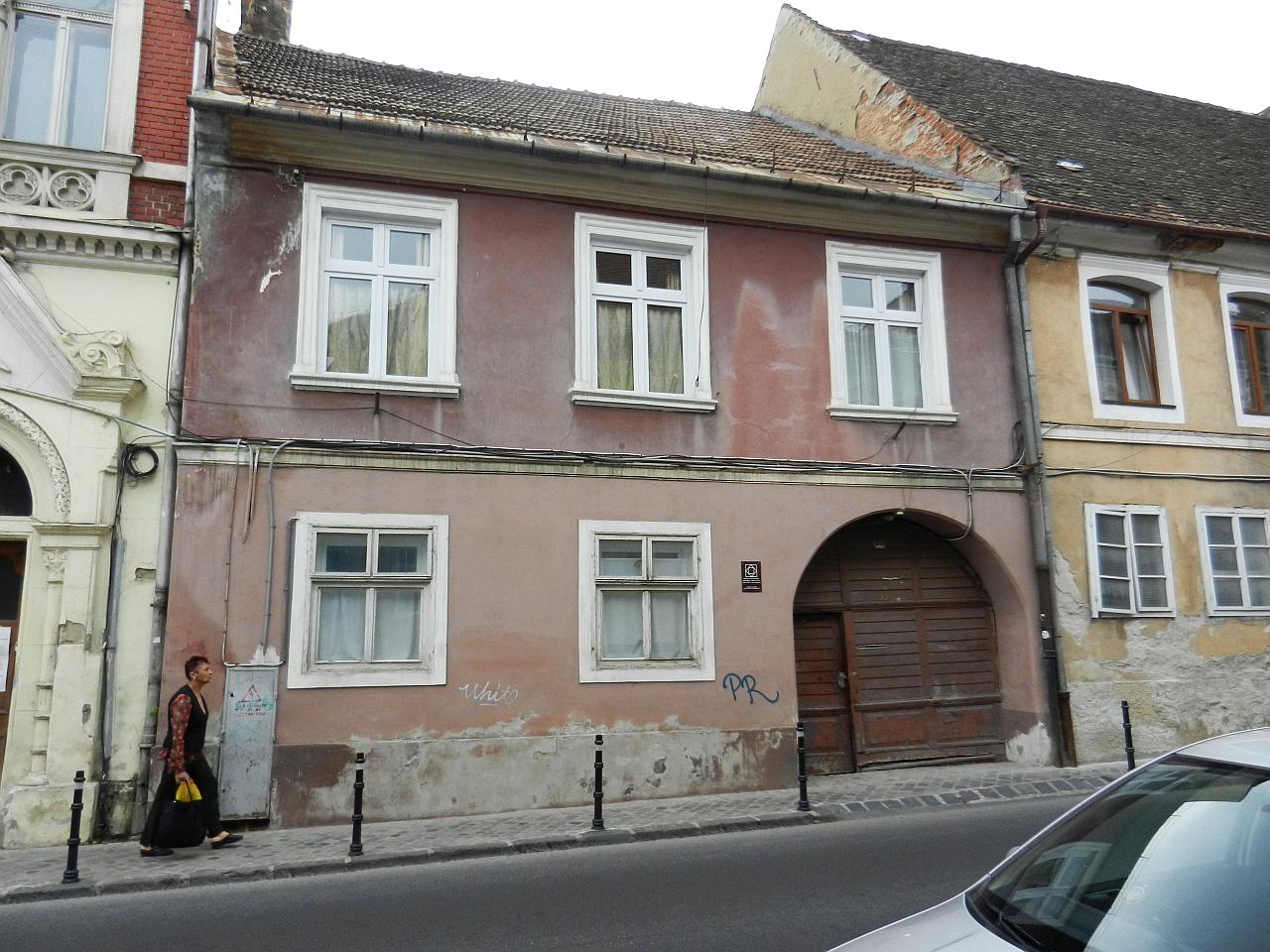 Casă monument istoric